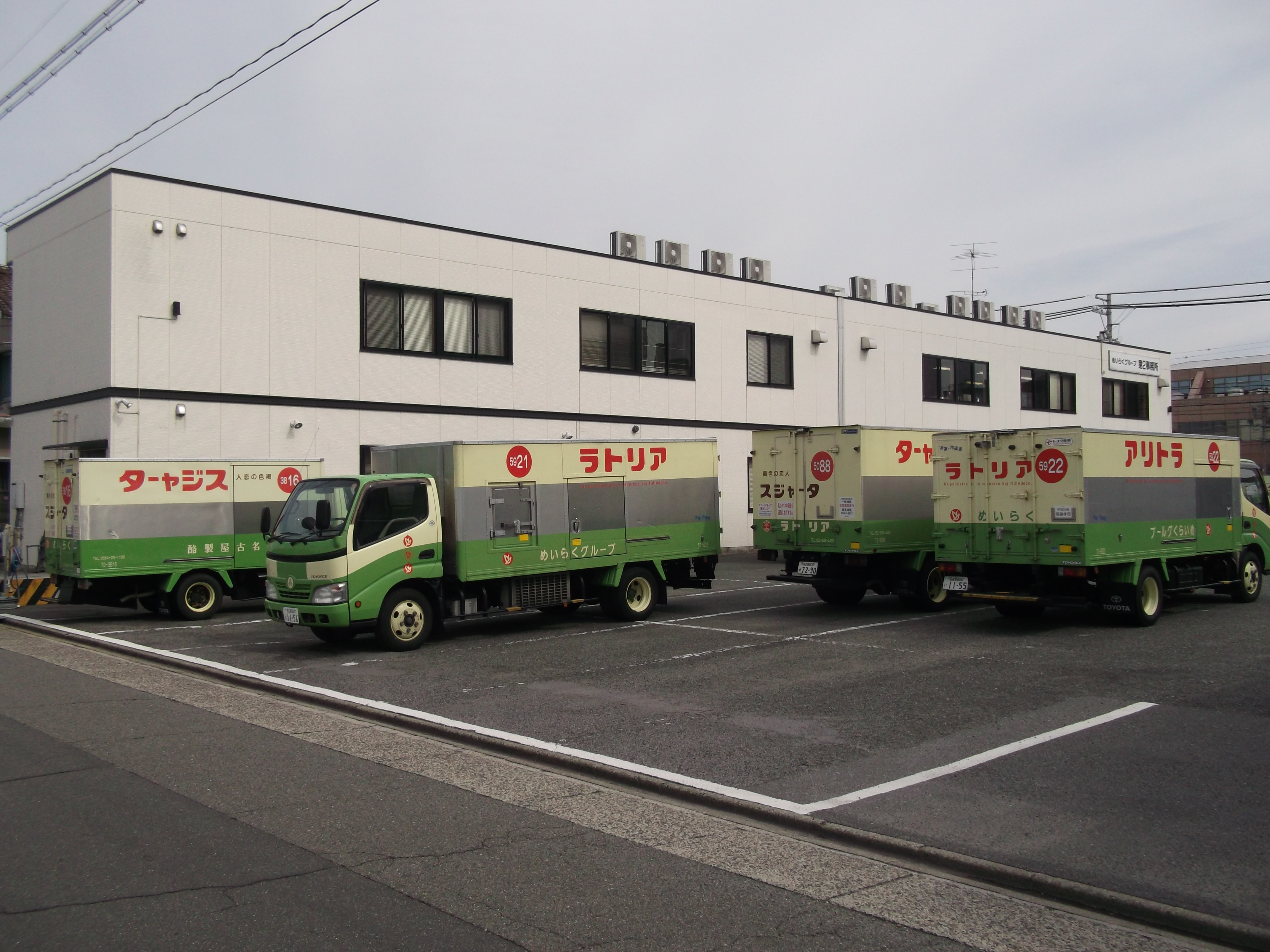 名古屋市天白区中砂町のめいらくグループ第2事務所を北側公道西側より撮影